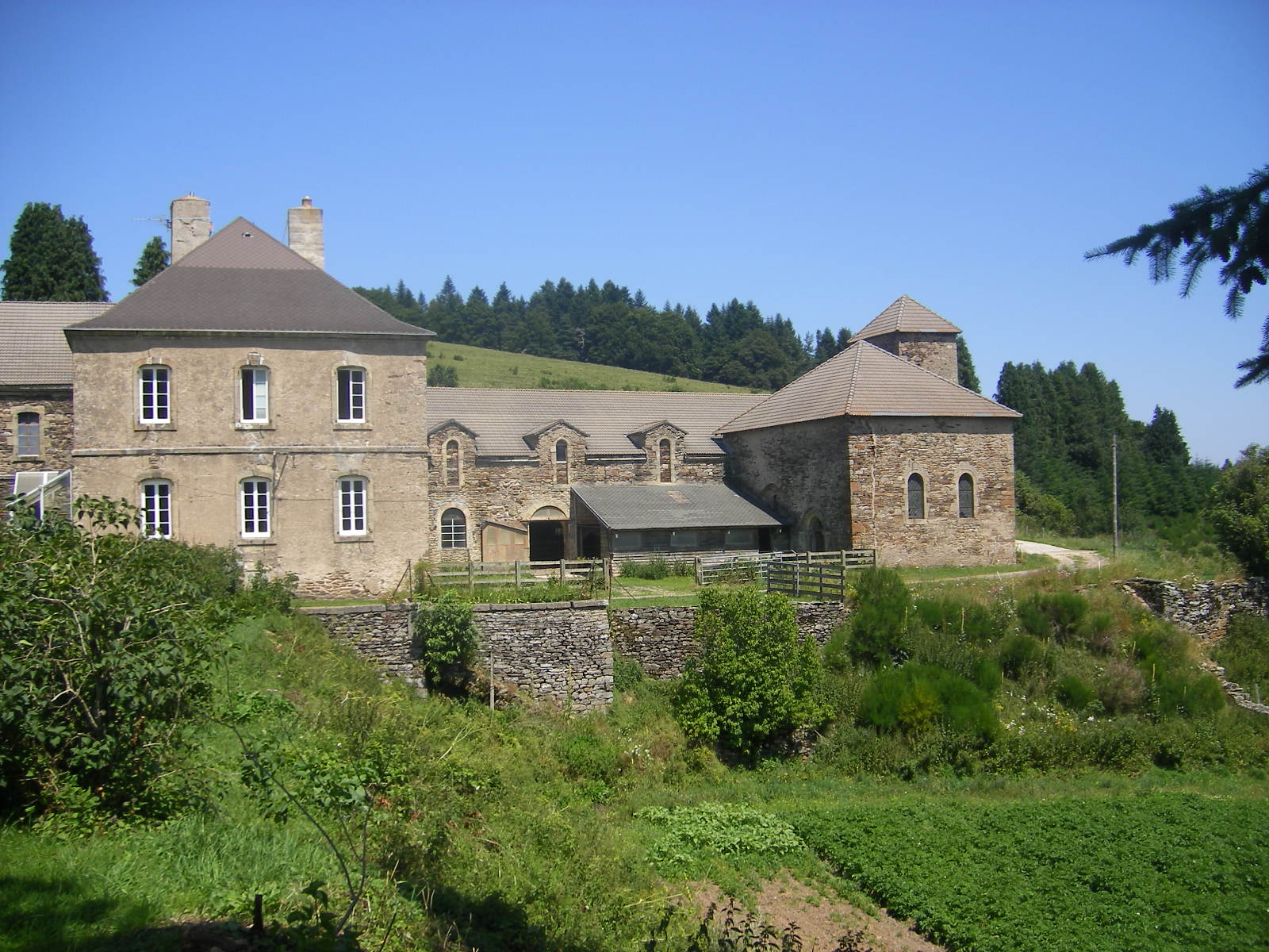 Ancient Mercoire Abbey (commune Cheylard-l'Évêque)